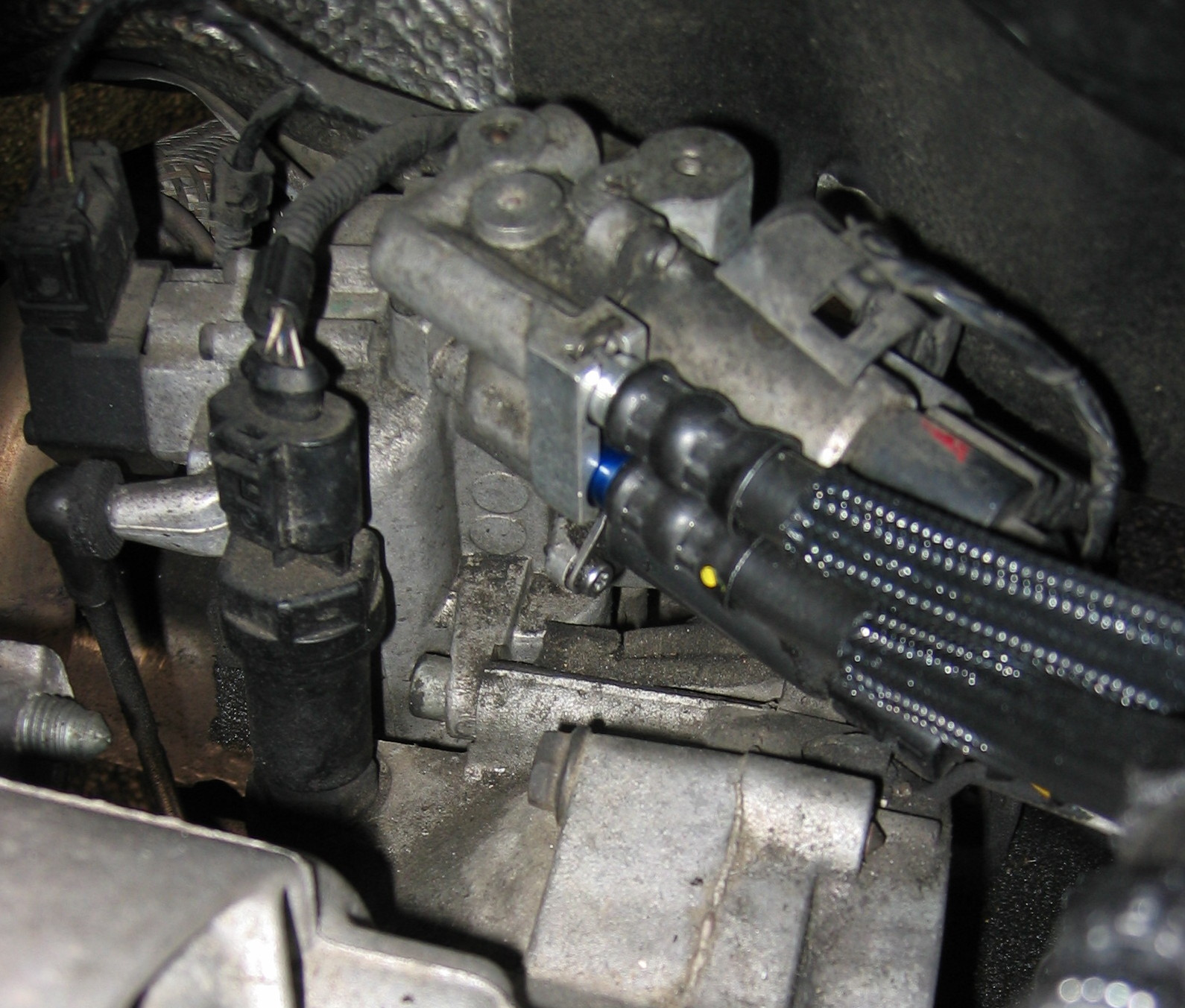 Hydraulischer Gang- und Gasseinsteller aein VP Lupo 3L